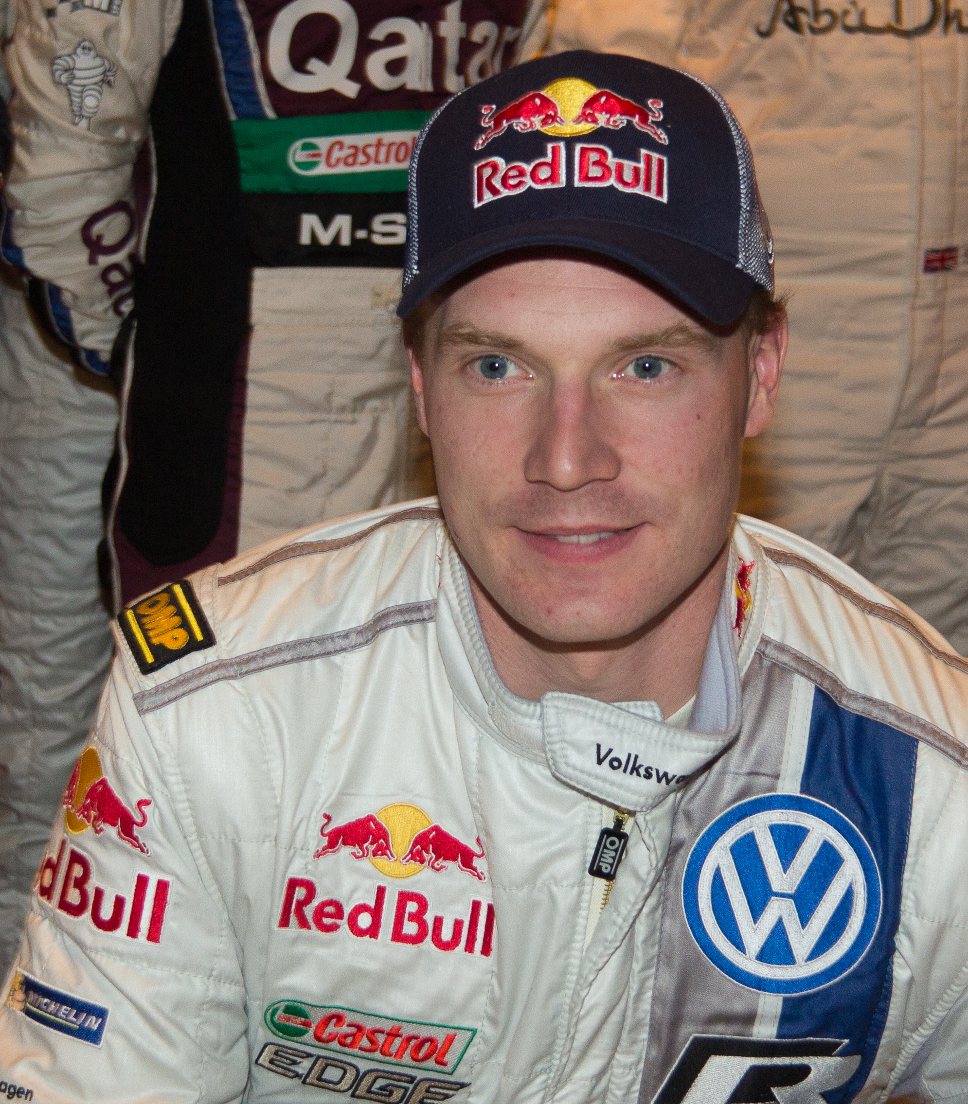 ADAC Rallye Deutschland 2013 - Empfang der Stadt Köln - Jari-Matti Latvala